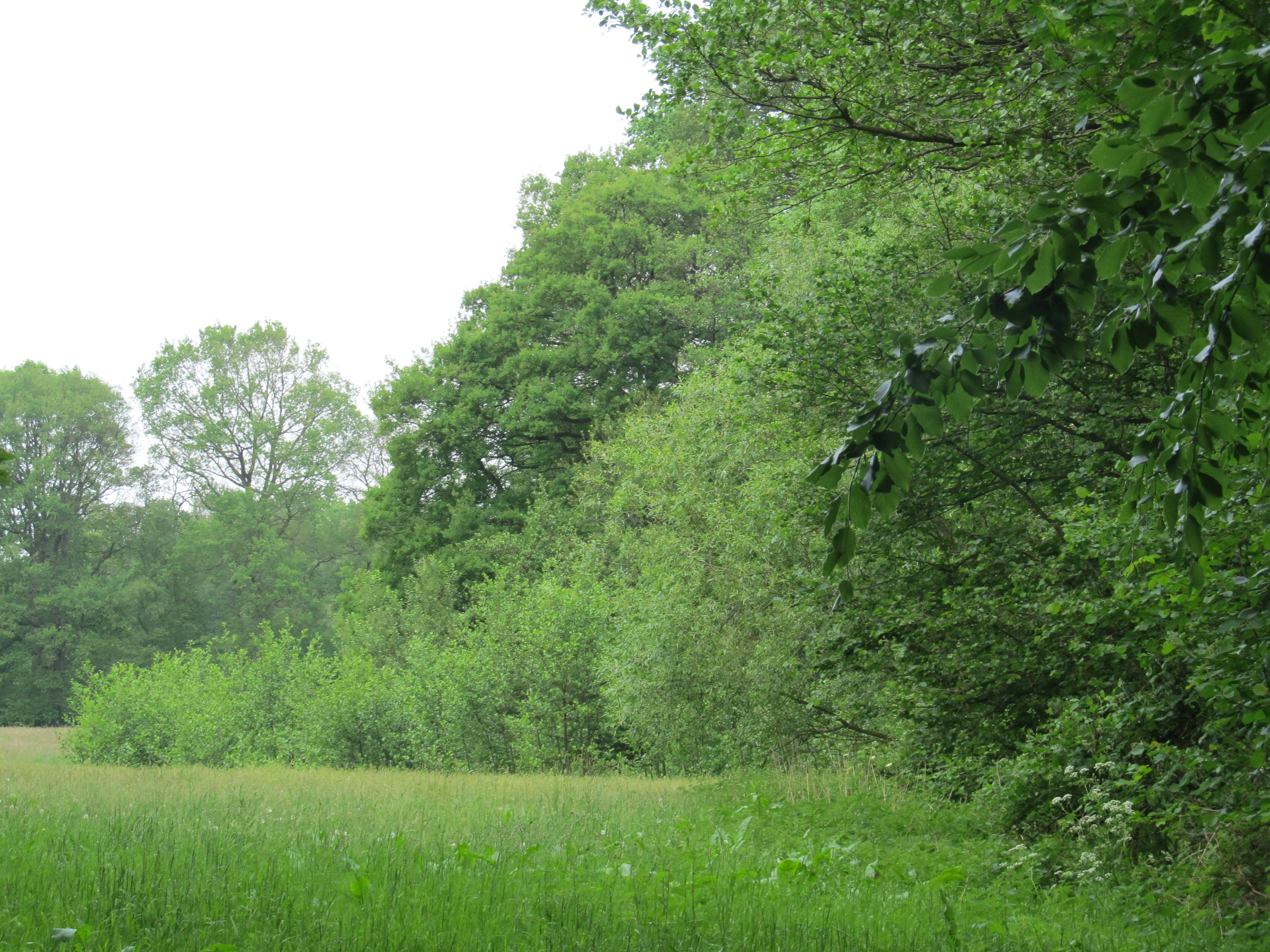 Glooiende bosranden.